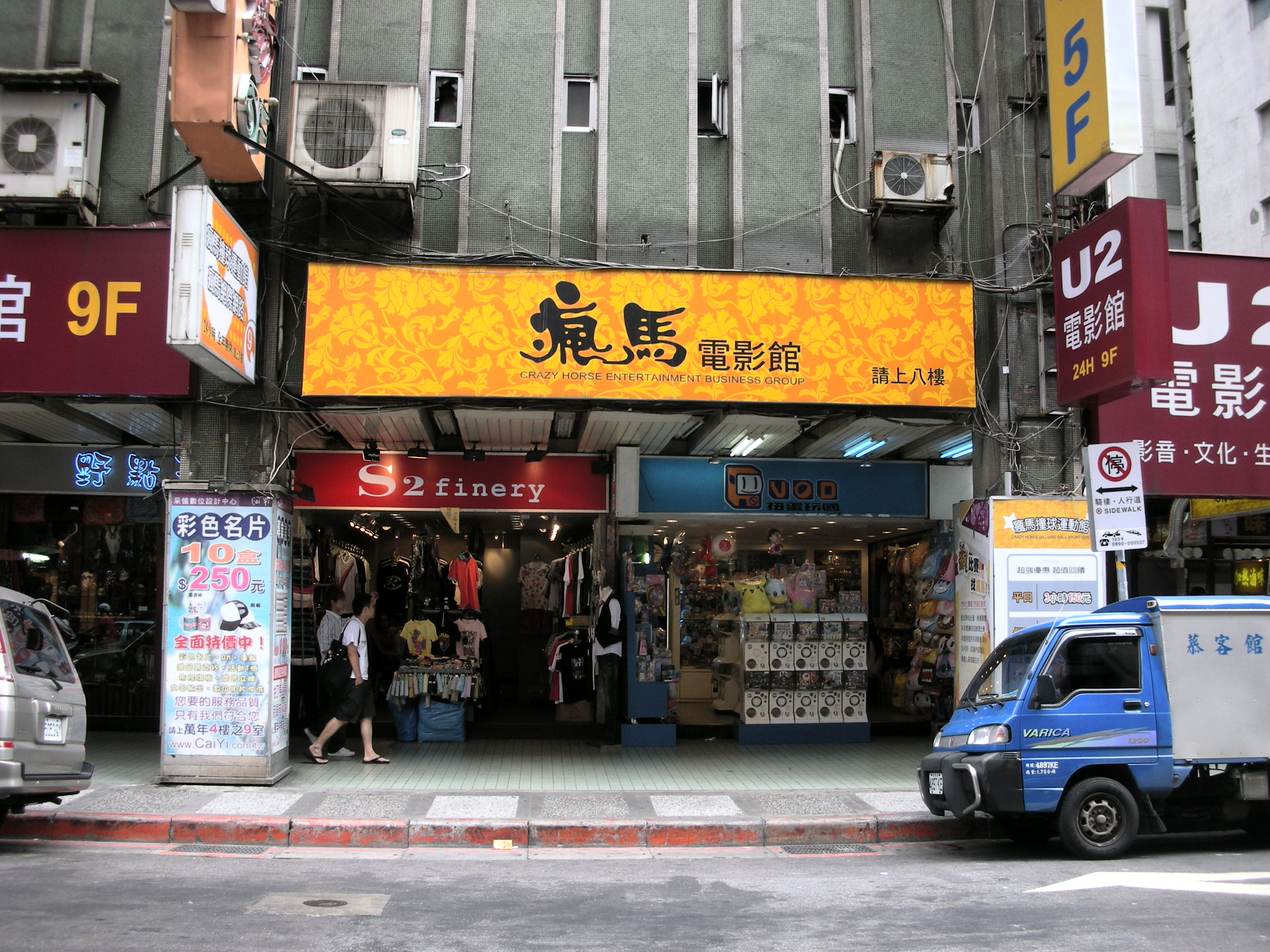 西門町走一圈